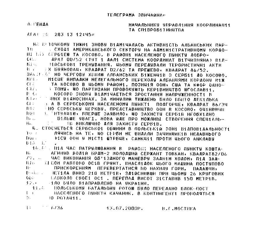 Телеграма від українського контингенту 13.07.2000 в Косово до начальника управління координації в Україні